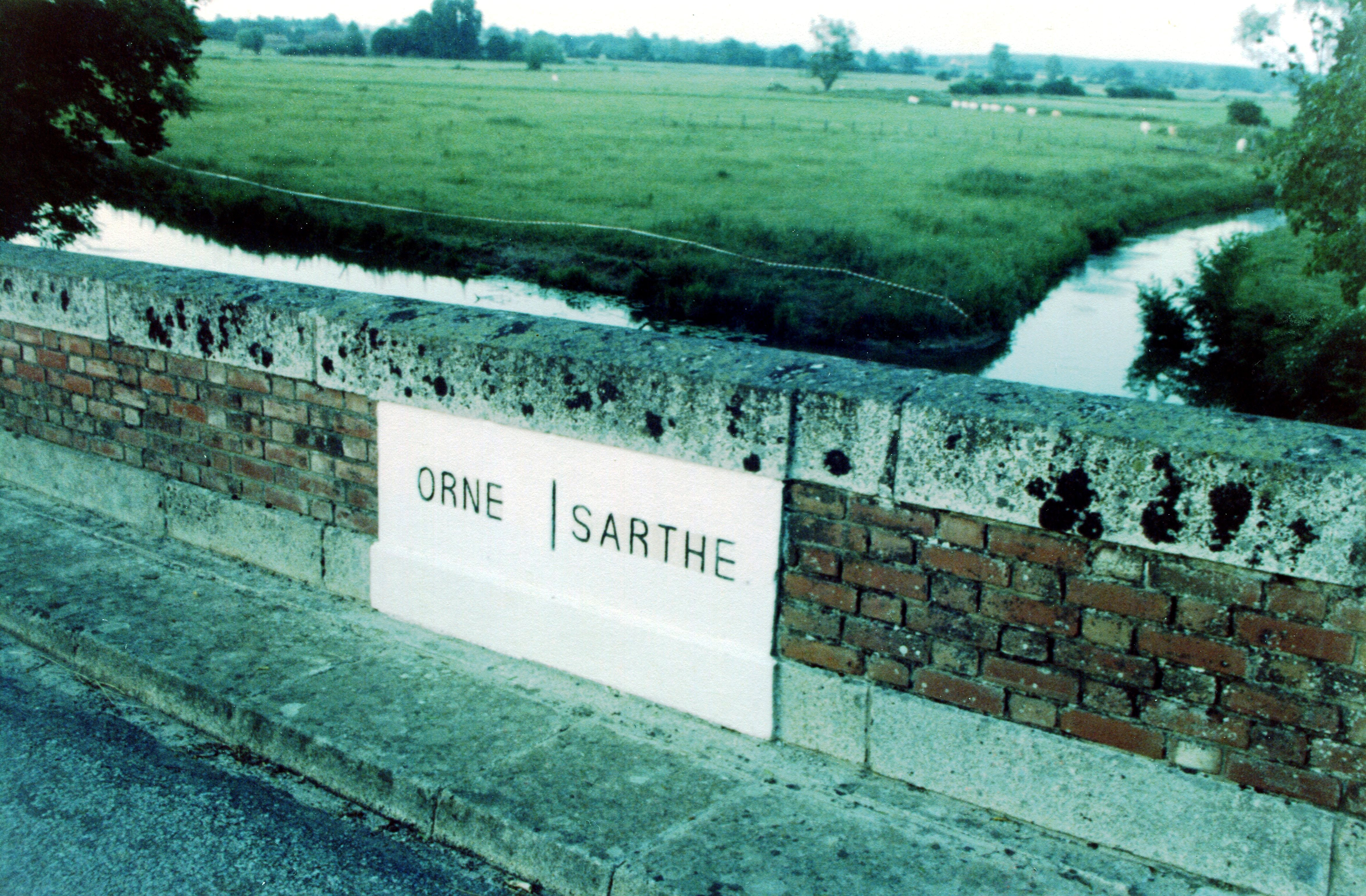 Hauterive (Orne) - Chassé (Sarthe) la Sarthe, limite des départements - pont du D209 (Orne) - D127 (Sarthe). la vue est vers l'île entre deux branches de la Sarthe du coté de Hauterive.